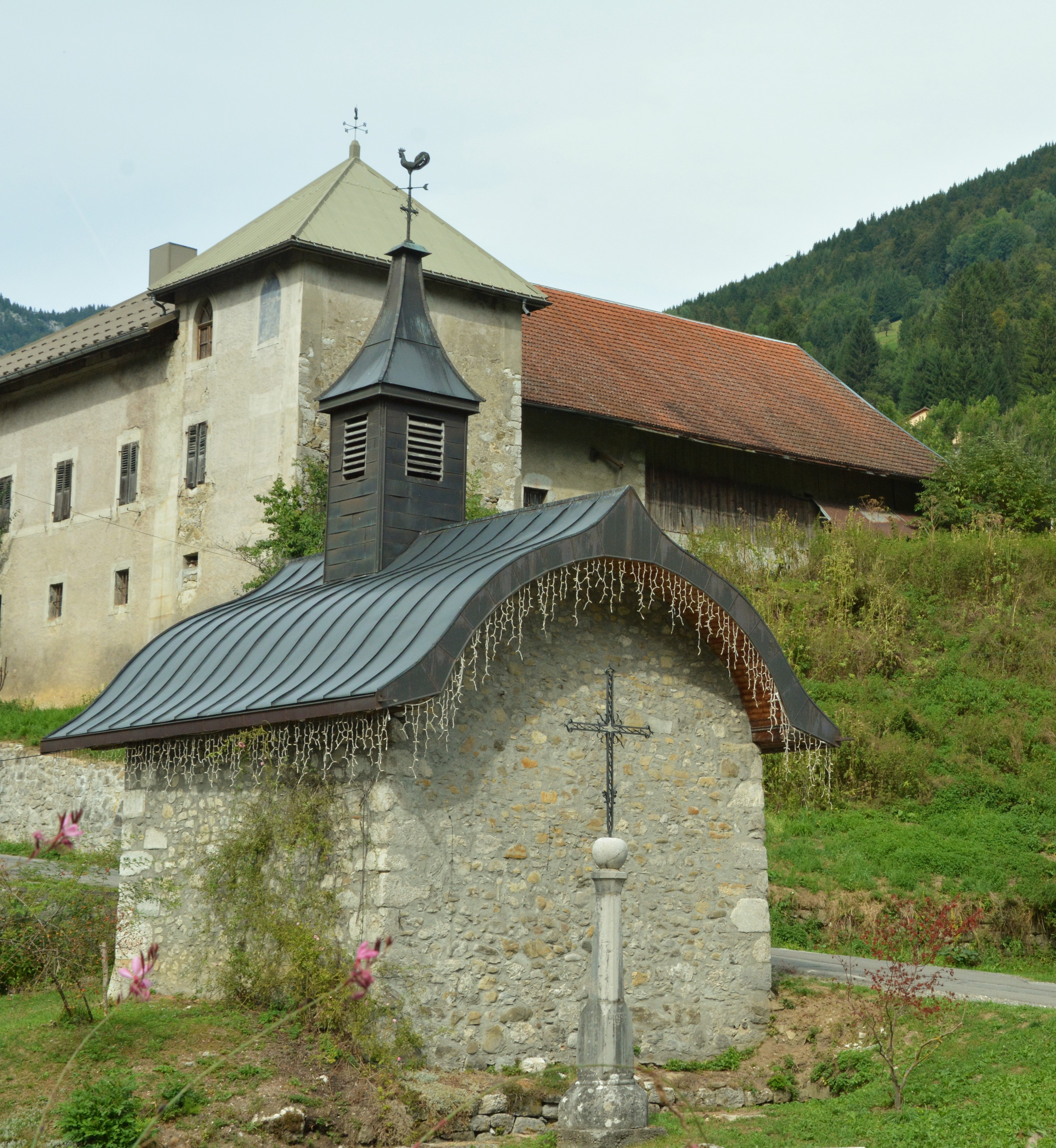 Chapelle de "La Rivière"et maison forte.